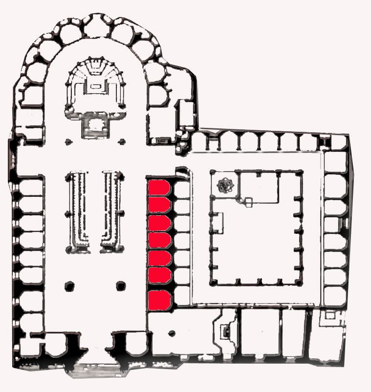 Situació de les capelles del costat de l'Epístla dins de la catedral de Barcelona